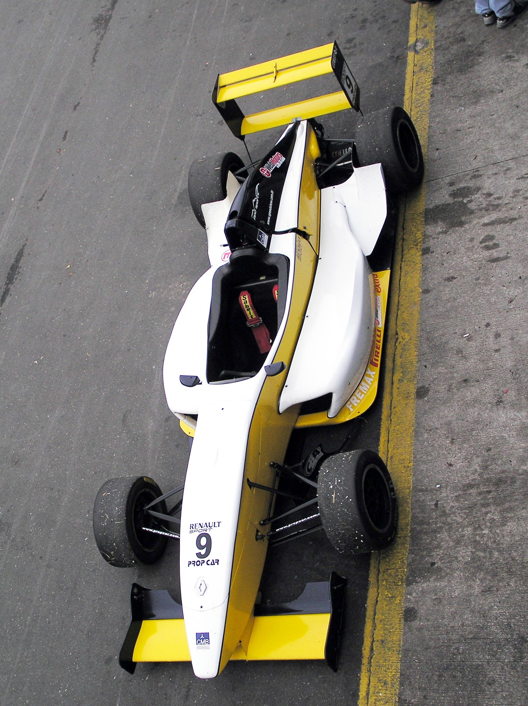 Formula Renault car: Brasil Prop Car